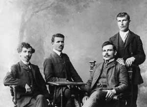 Hristo P Tsvetkov, Andon Tarpov Yurukov, Pando Sidov & Vasil Ivanov